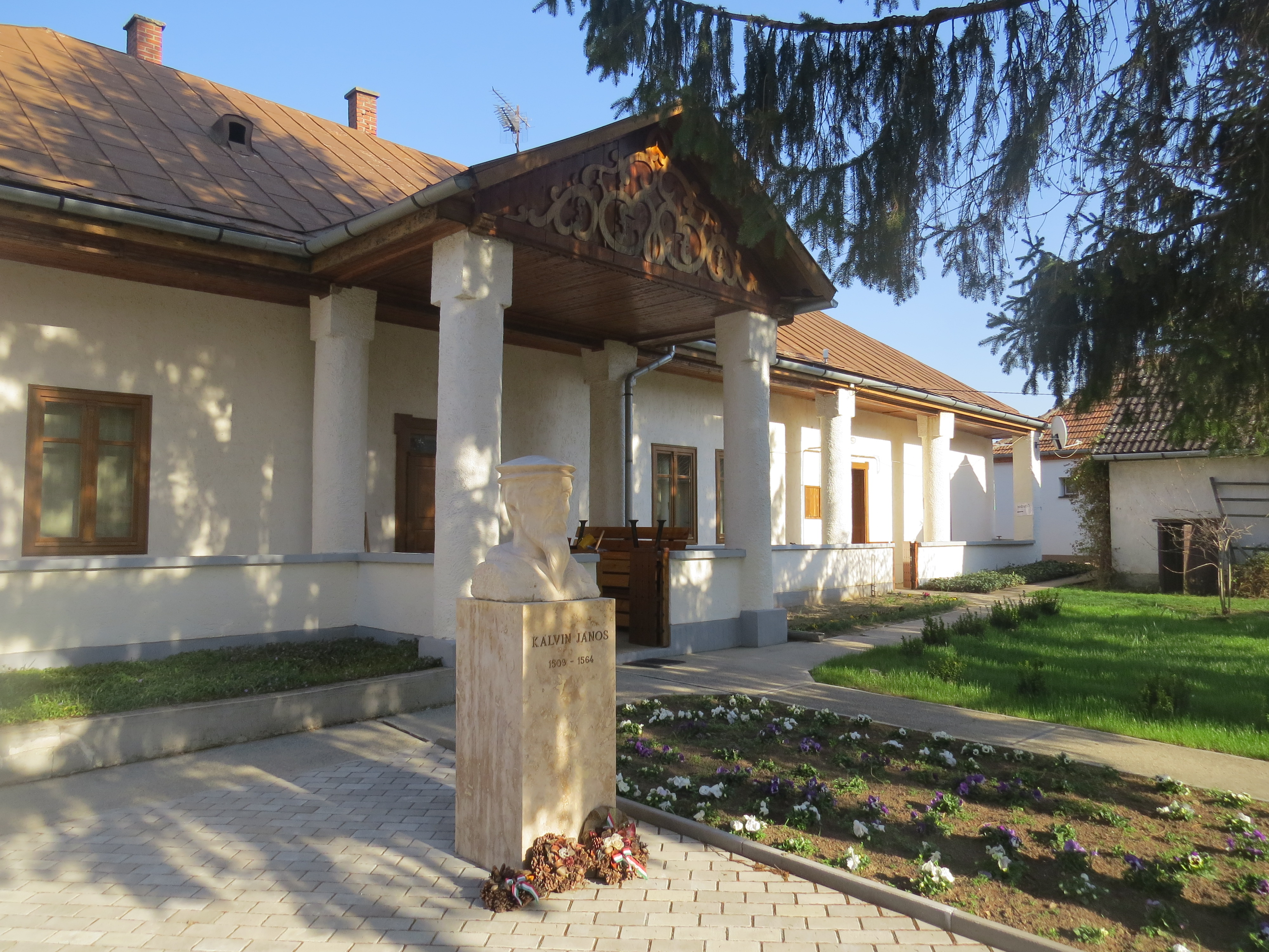 A cigándi református templom szomszédságában található, a református parókia. A kép előterében a 2017-ben elkészült Kálvin János mellszobor - Czigándi Varga Sándor alkotása - látható.